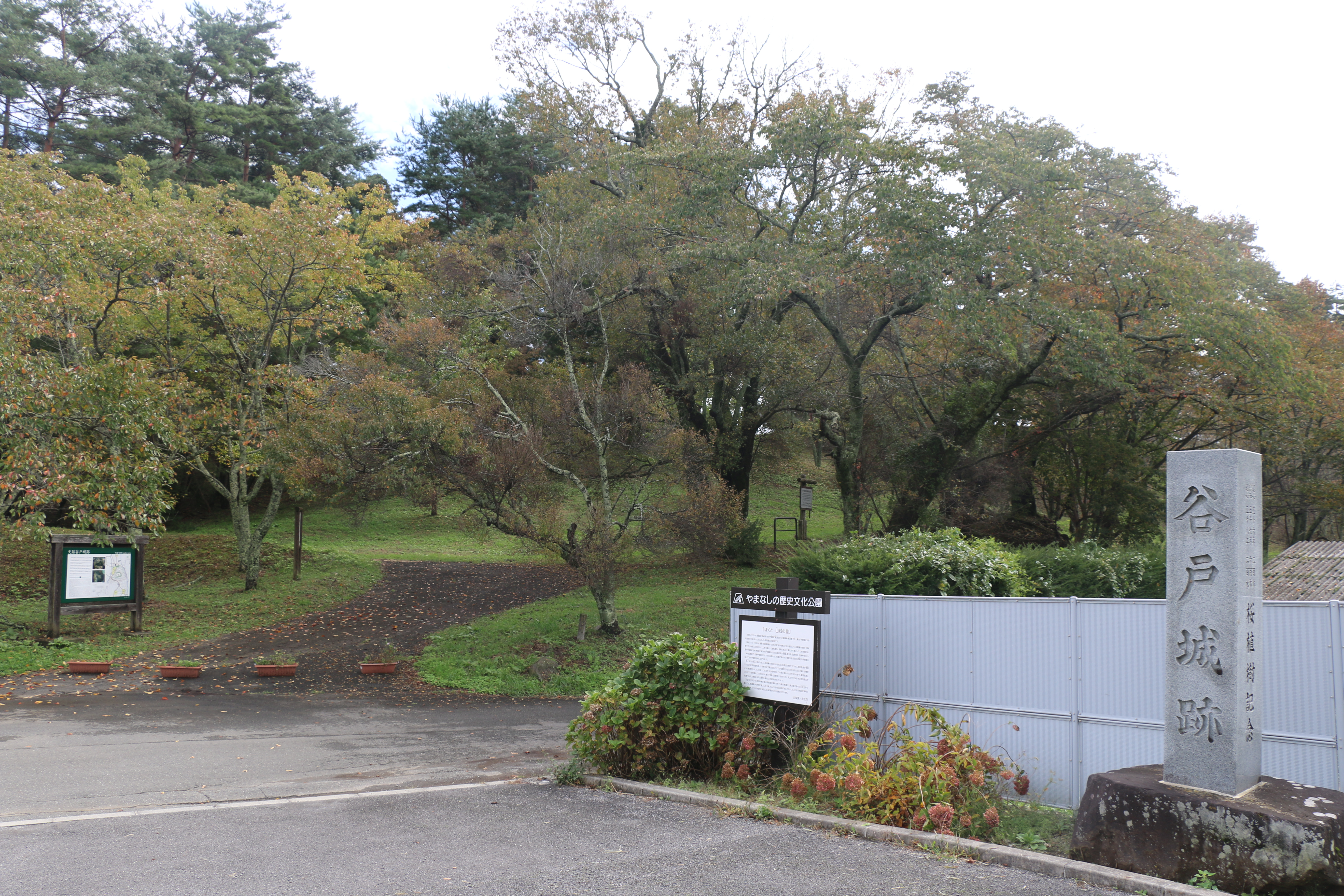 山梨県北杜市にある谷戸城跡